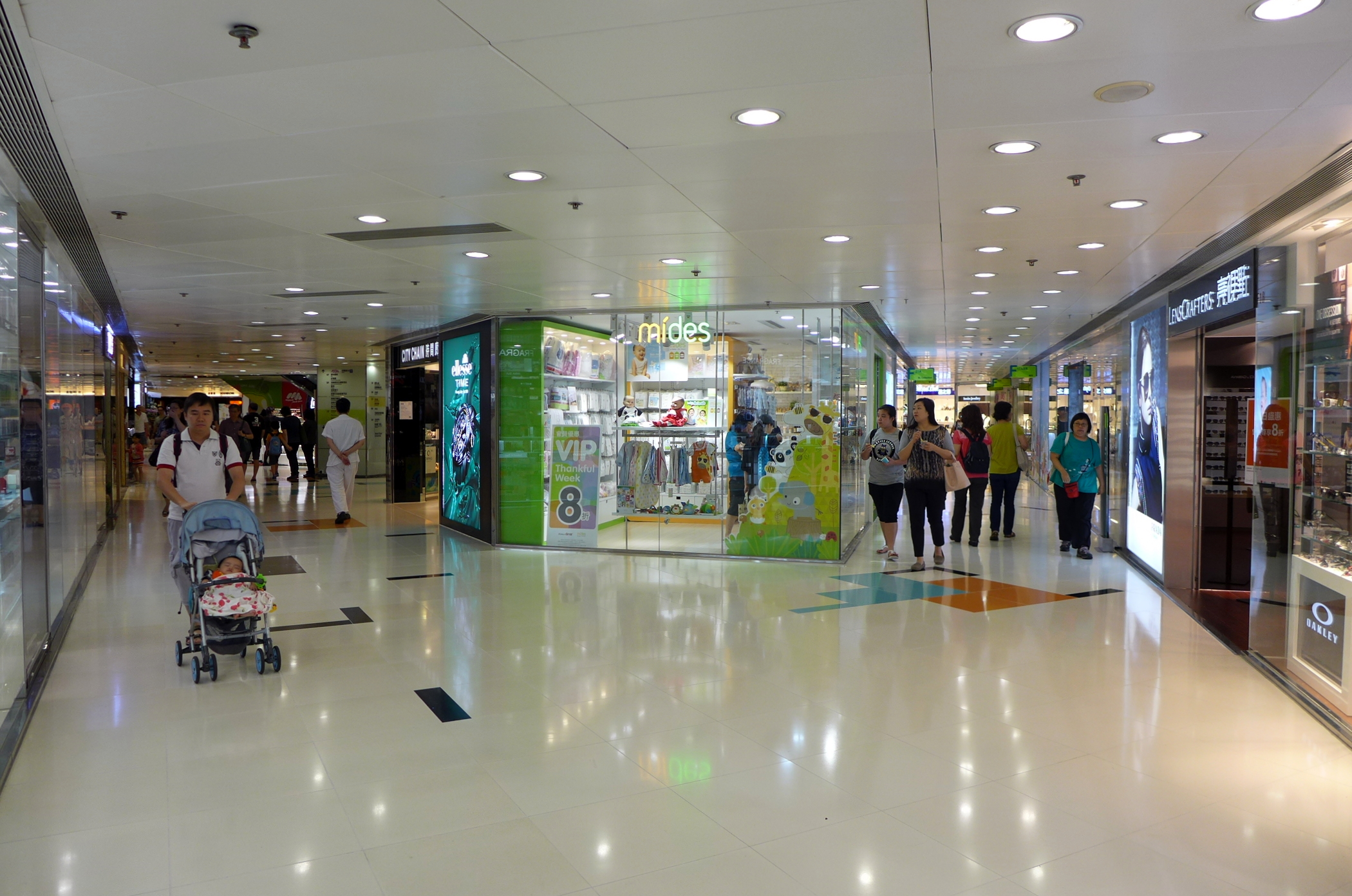 Kornhill Plaza Level 1 Shops